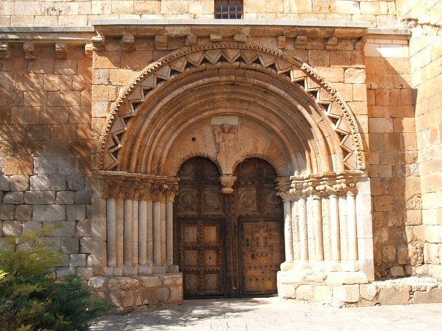 Aragonés: Frontera d'a ilesia de San Miguel de Caltojar, edifizio en estilo romanico, d'o sieglo XIII.